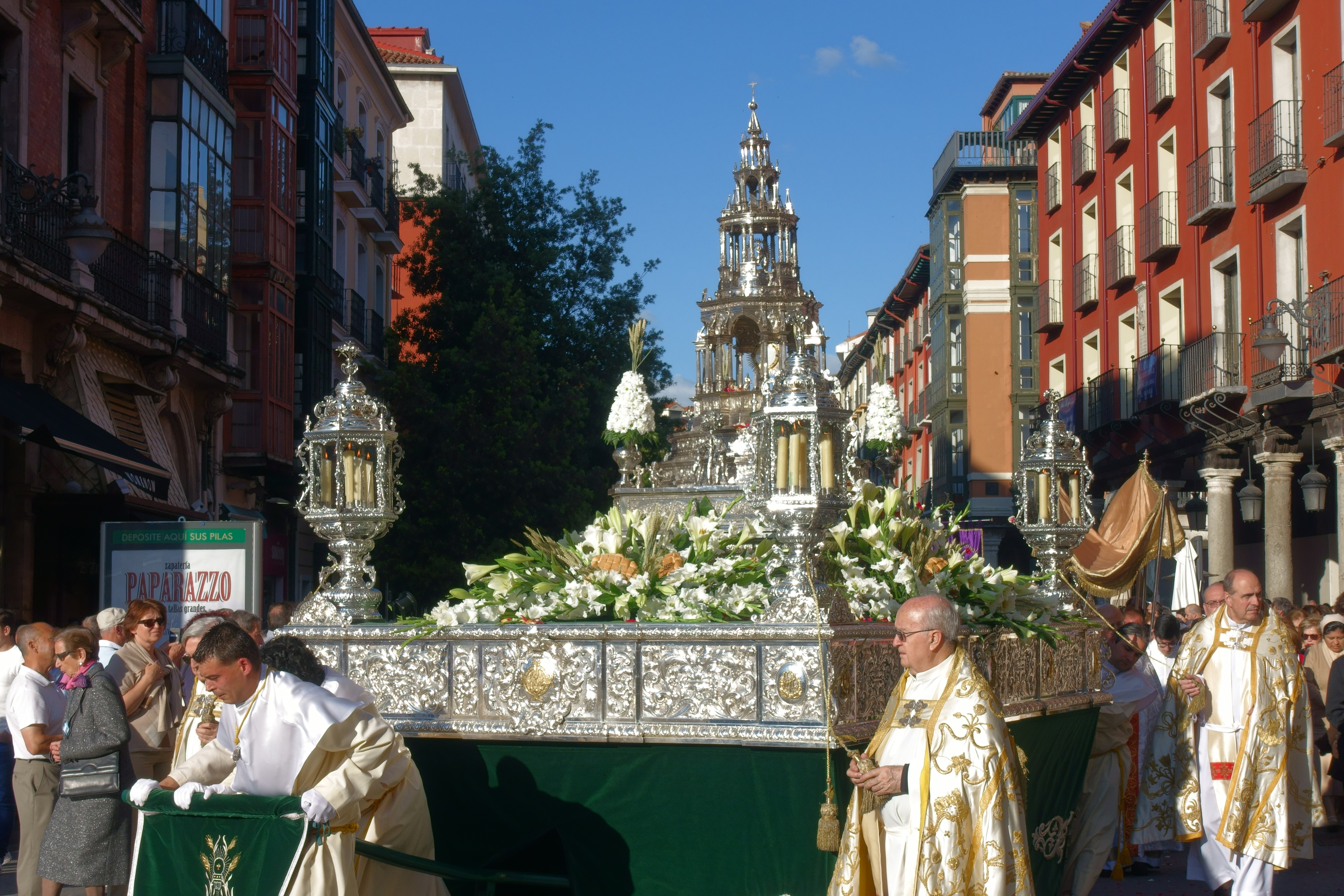 Procesión del Corpus Christi en Valladolid en junio de 2018.